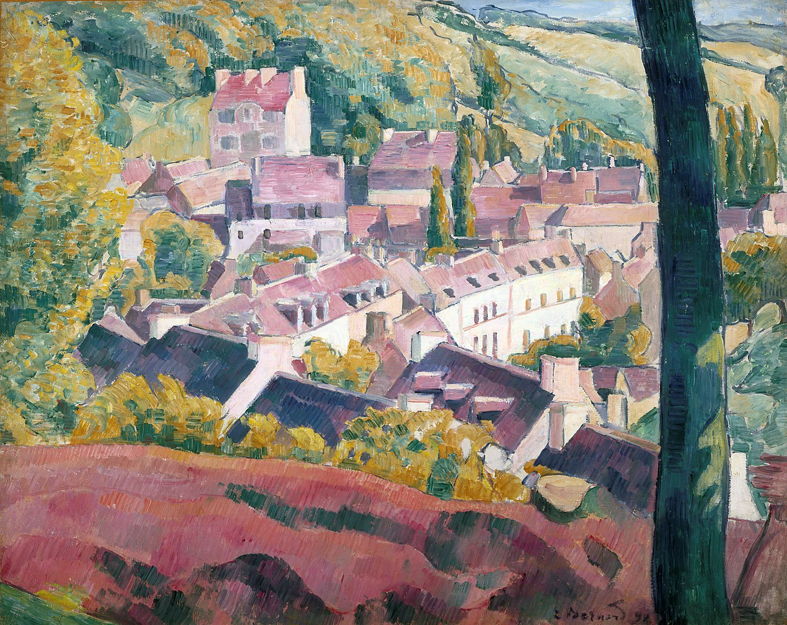 CEZANNE en 1906 : « Les sensations faisant le fond de mon affaire, je crois être impénétrable. Je laisserai d’ailleurs le malheureux que tu sais me pasticher tout à son aise, ce n’est guère dangereux. » (CEZANNE à son fils, Aix, 15 octobre 1906)